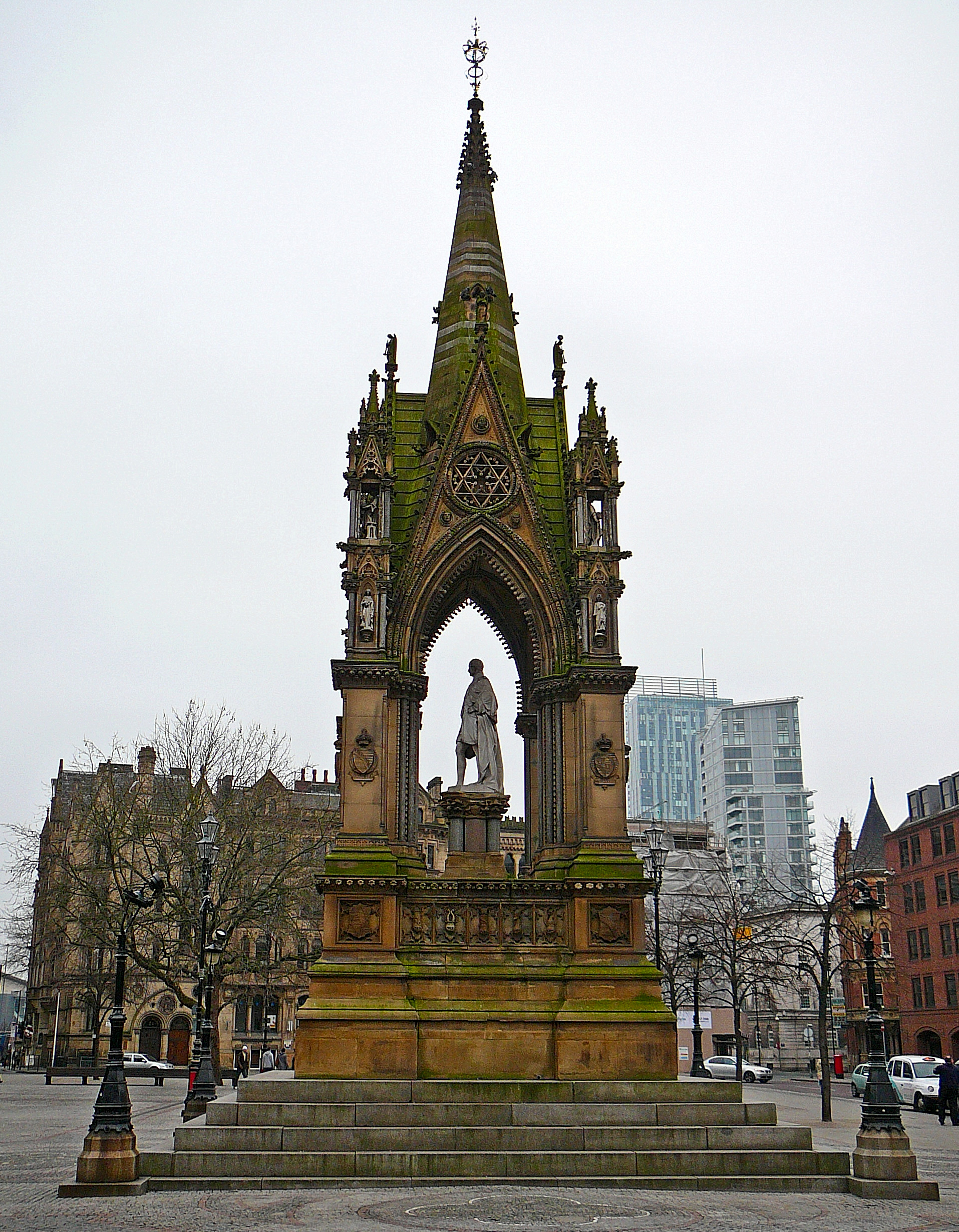 Albert Square, Manchester